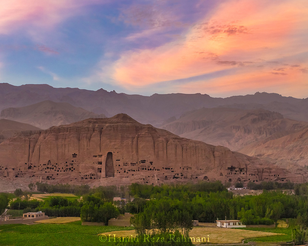 بودای بامیان